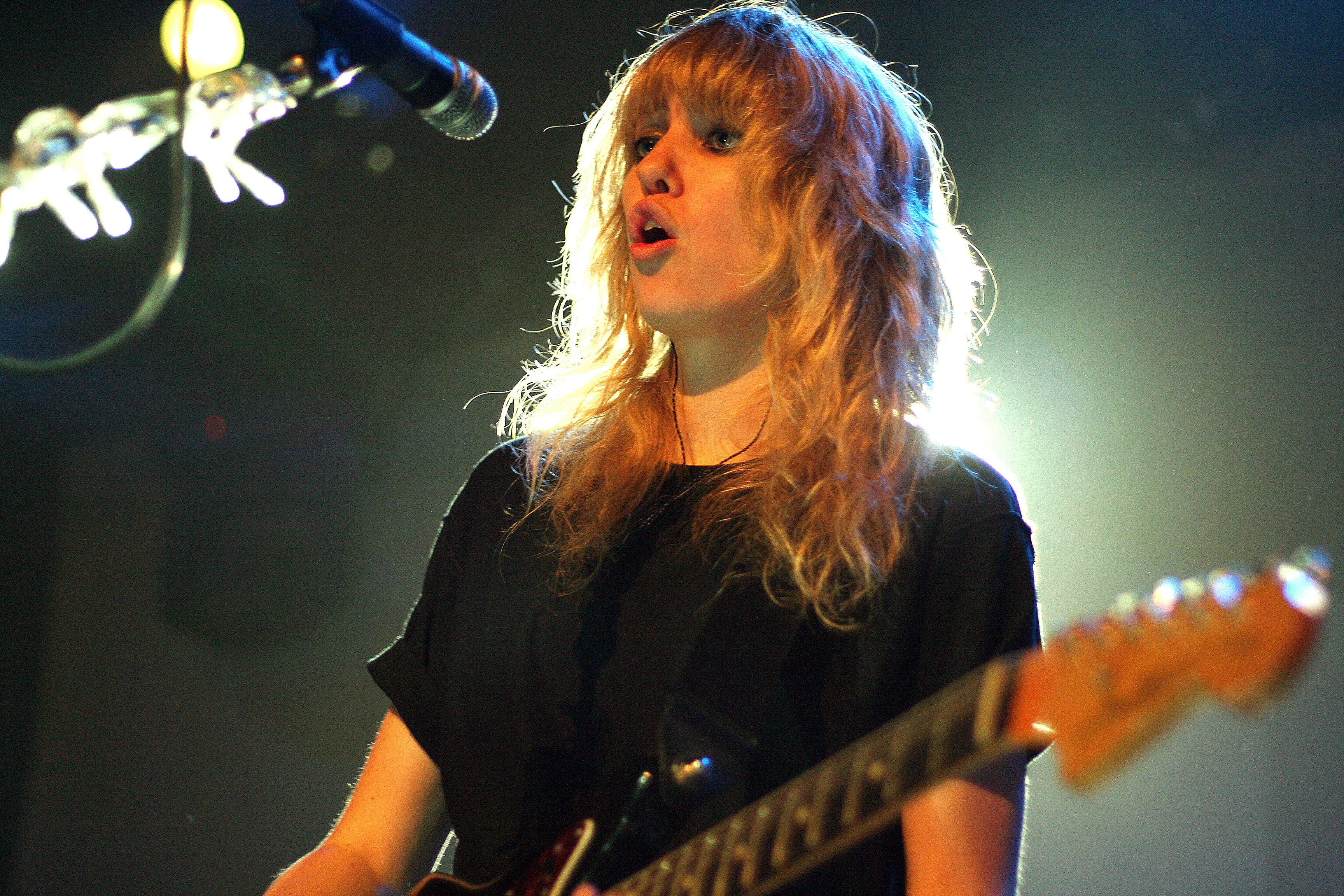 Ladyhawke @ Metro (19 09 2009)